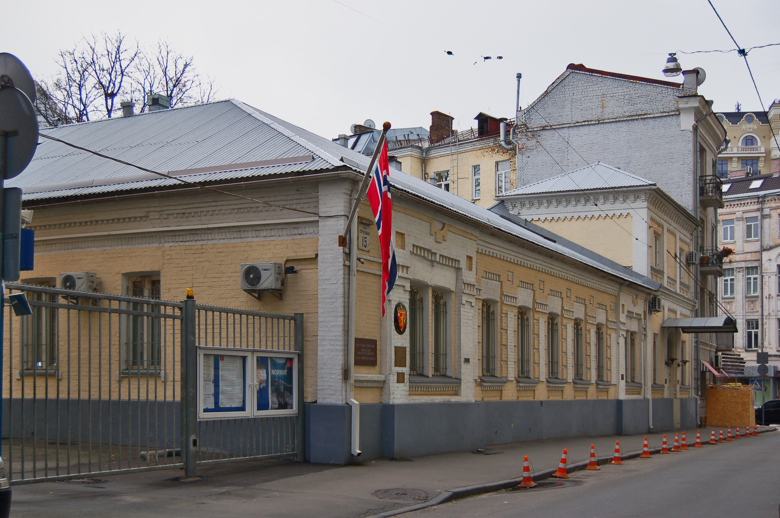 Будинок № 15 по Стрілецькій вулиці у Києві